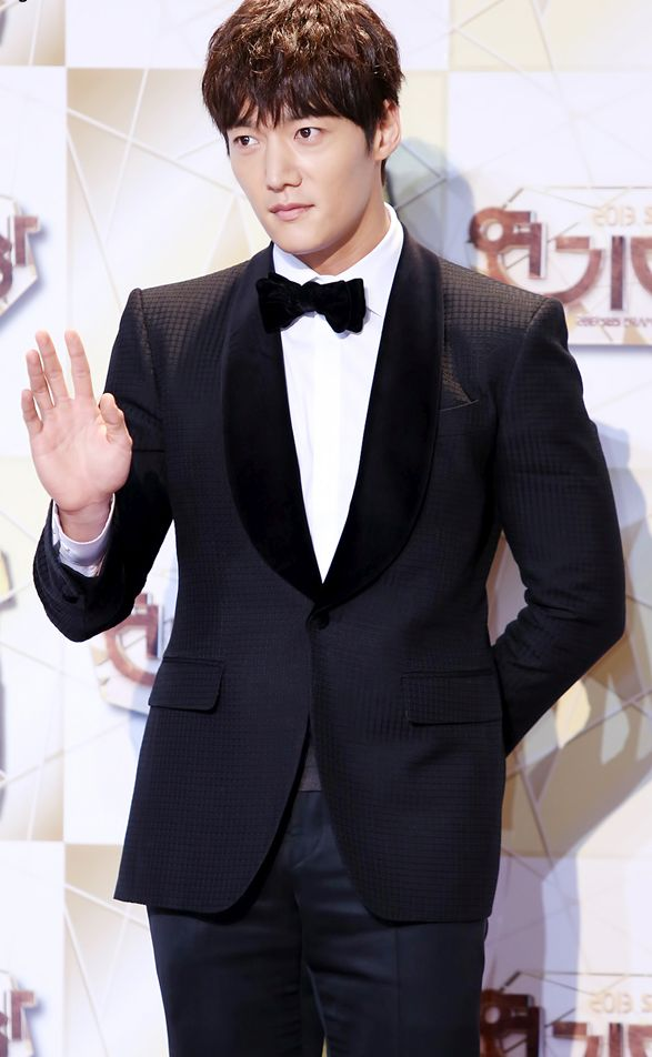 2013.12.31 SBS 演技大賞紅地氈-振赫